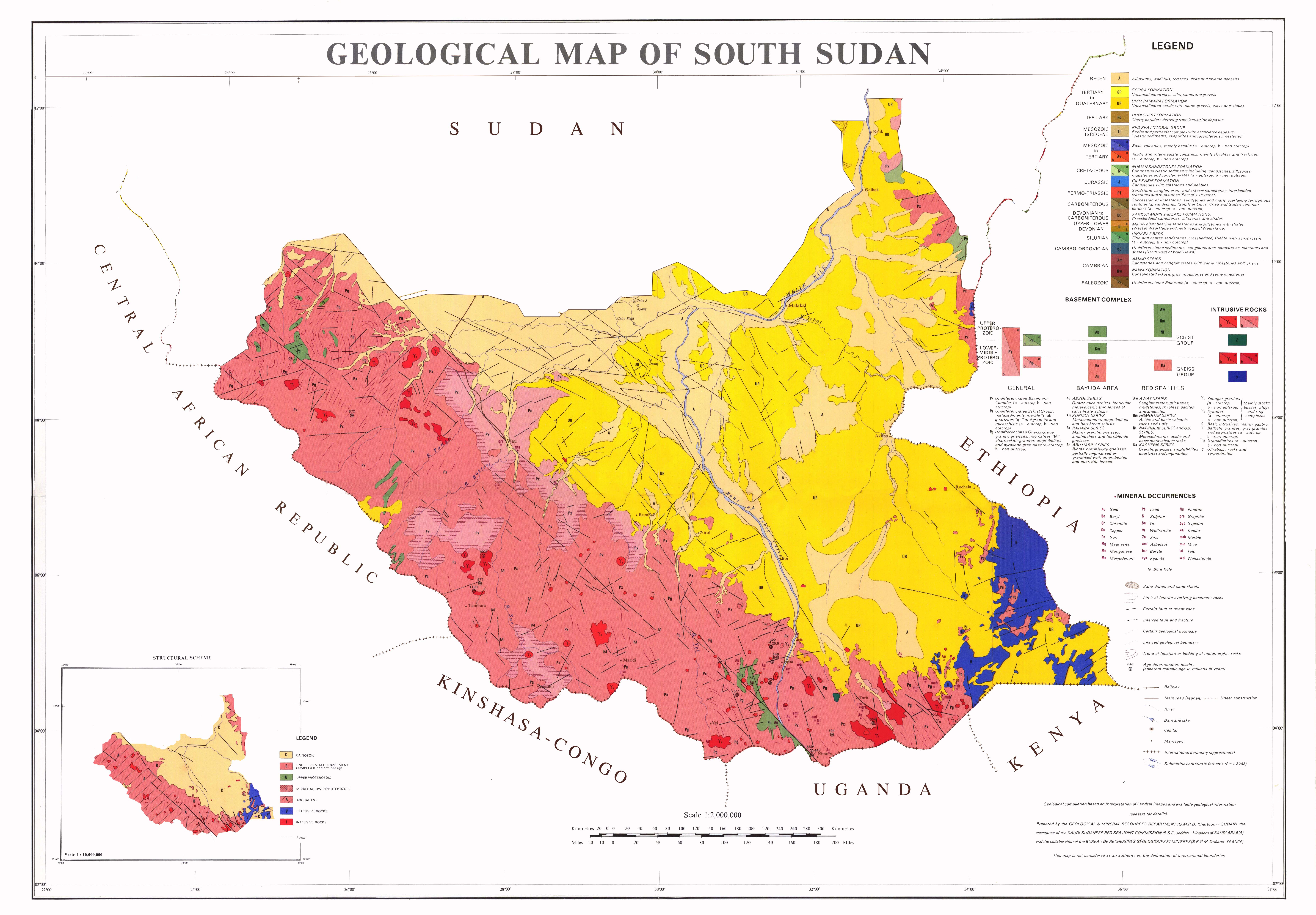 Carte géologique du Sud-Soudan, d'après des documents BRGM et autres, actualisés.